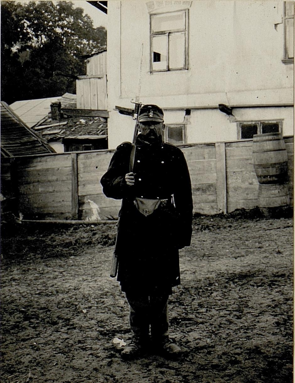 Ein Landsturmmann.